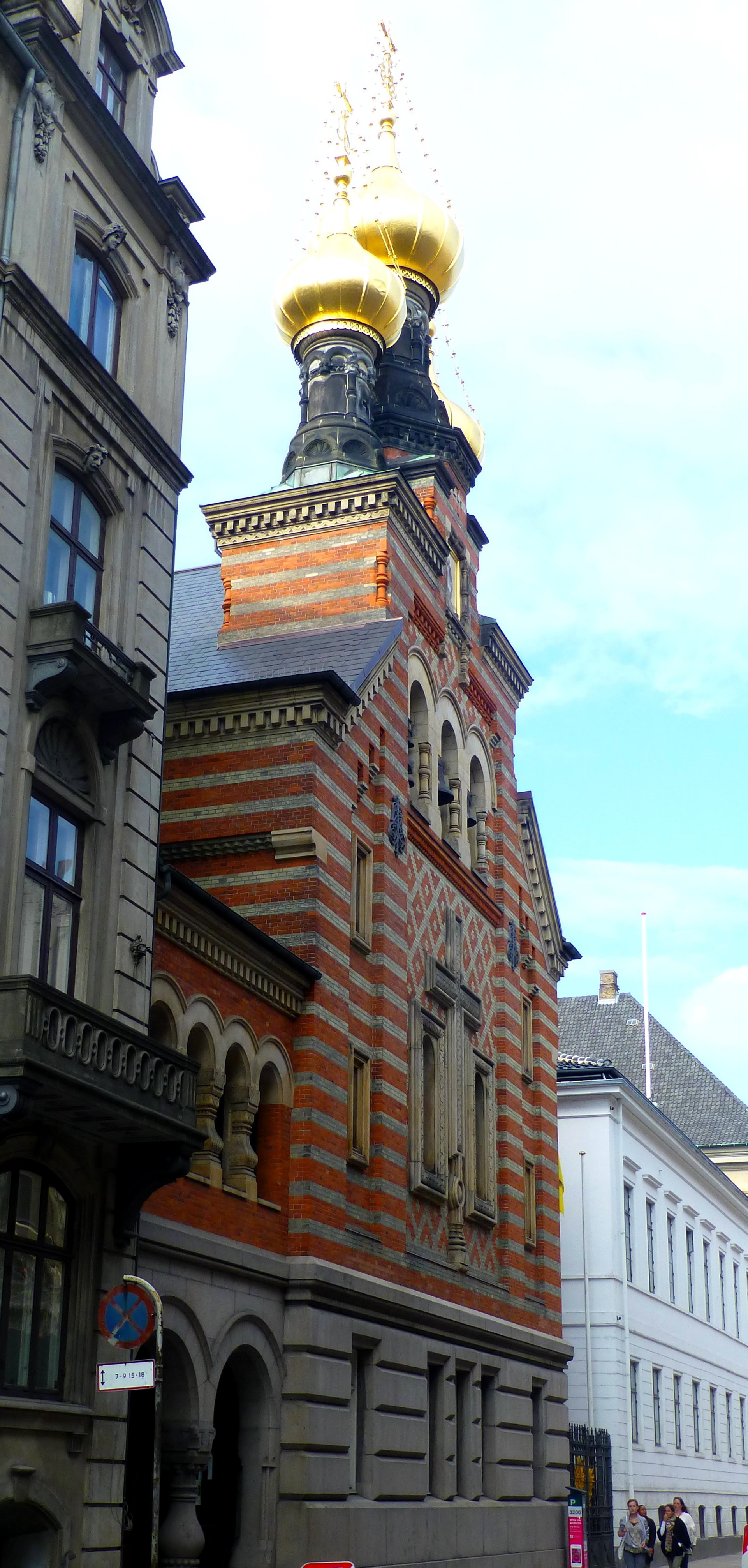 Kopenhagen - Russisch-Orthodoxe Kirche - Russisk-ortodokse kirke